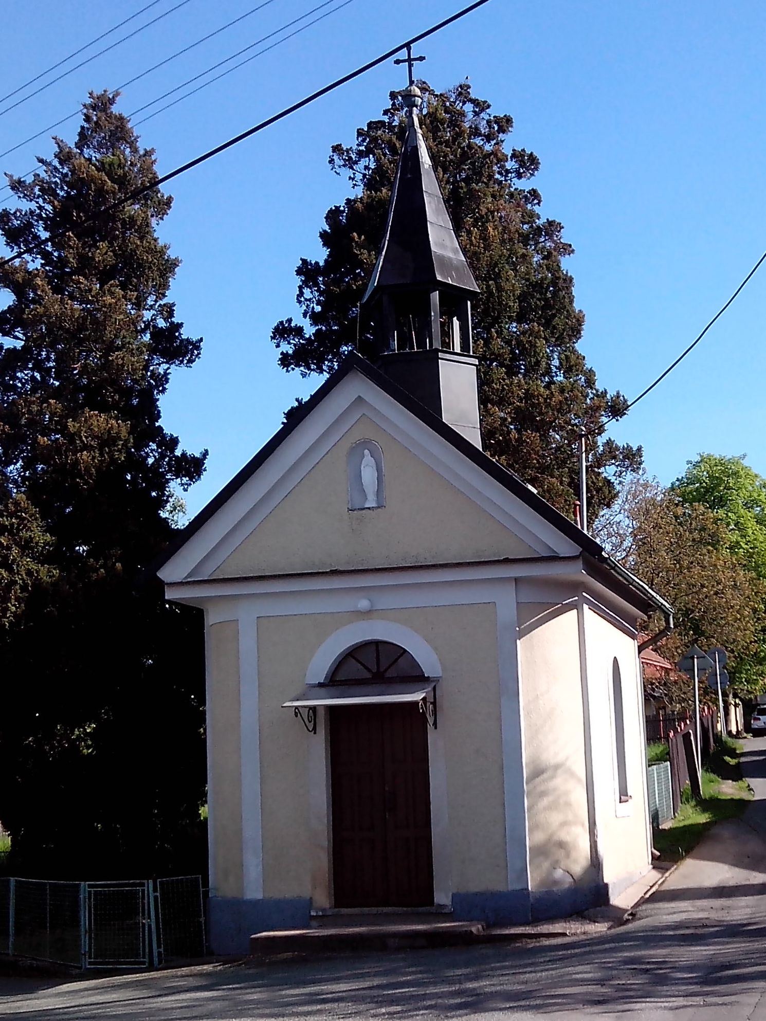 Kaple Jména Panny Marie (Kramolna)